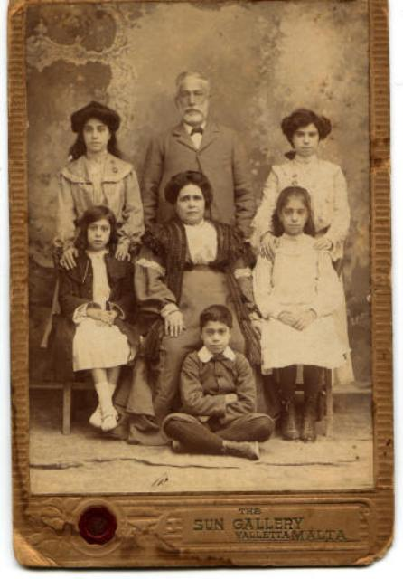 משפחה יהודית בוולטה בתחילת המאה ה-20 jewish Famiy in Valletta - Begininig of 20 century